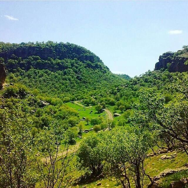 بانکول آسمان اباد